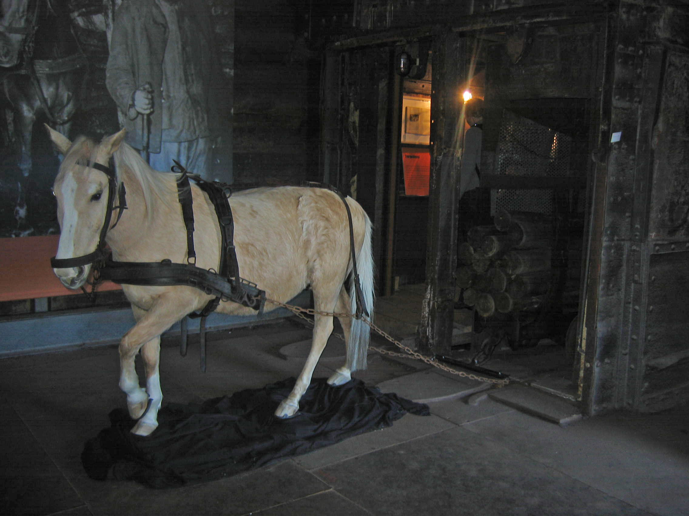 Grubenpferd bei einer Ausstellung der Zeche Hannover